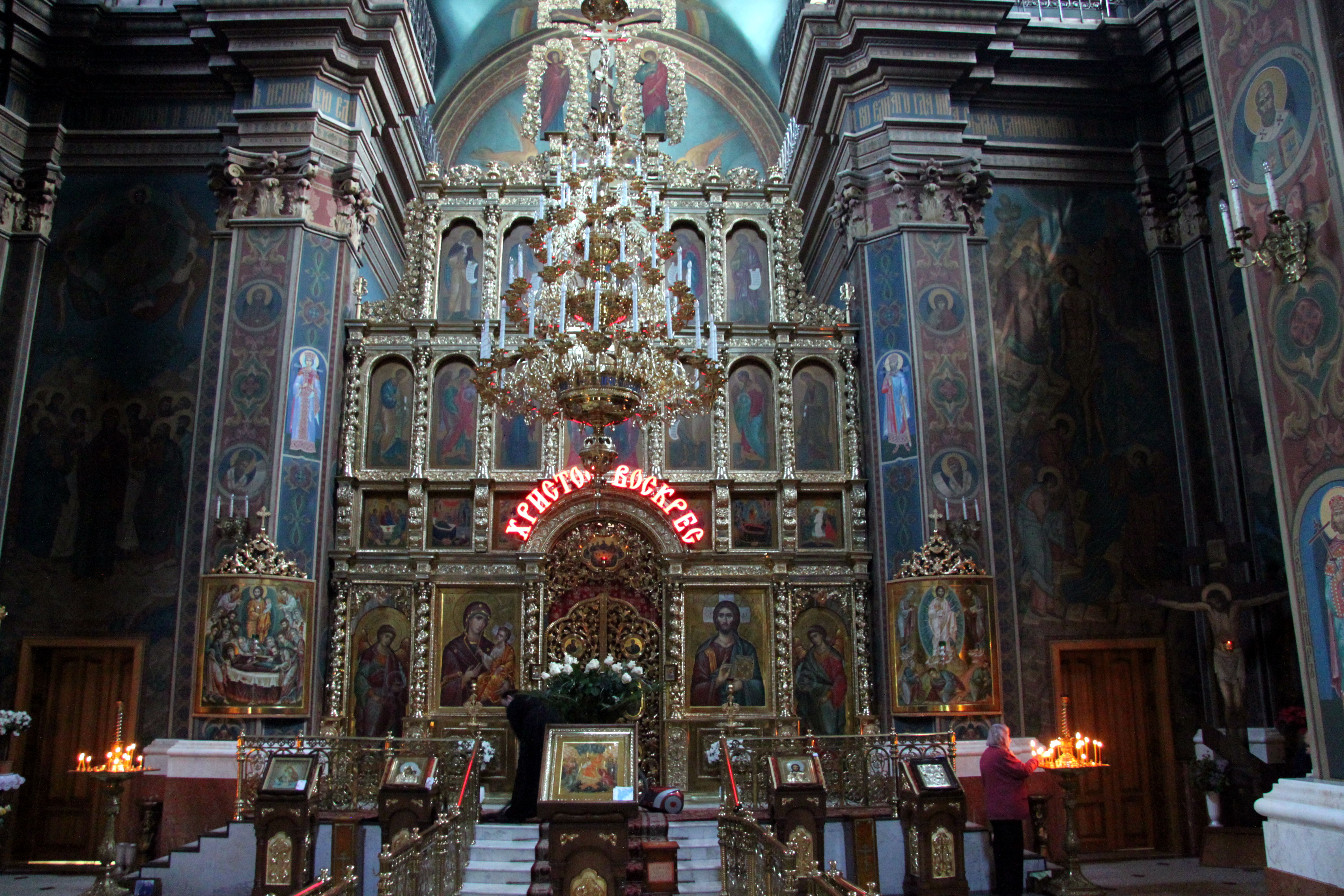 Домініканський монастир - Костьол, вул. Соборна, 23, Вінниця